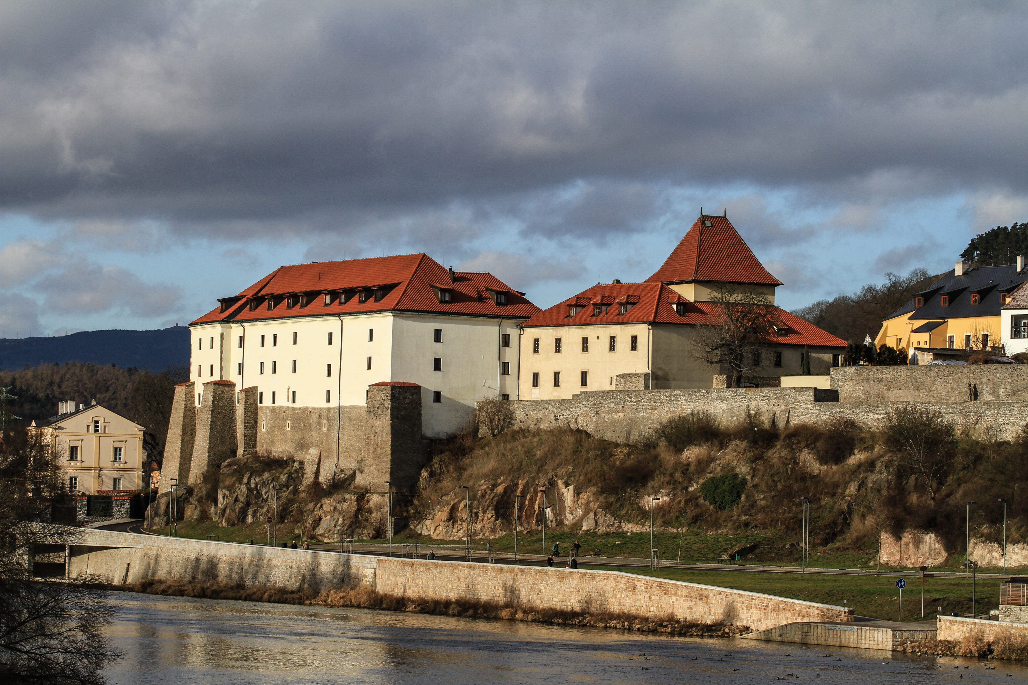 Hrad Kadaň, Tyršova 567, Kadaň.